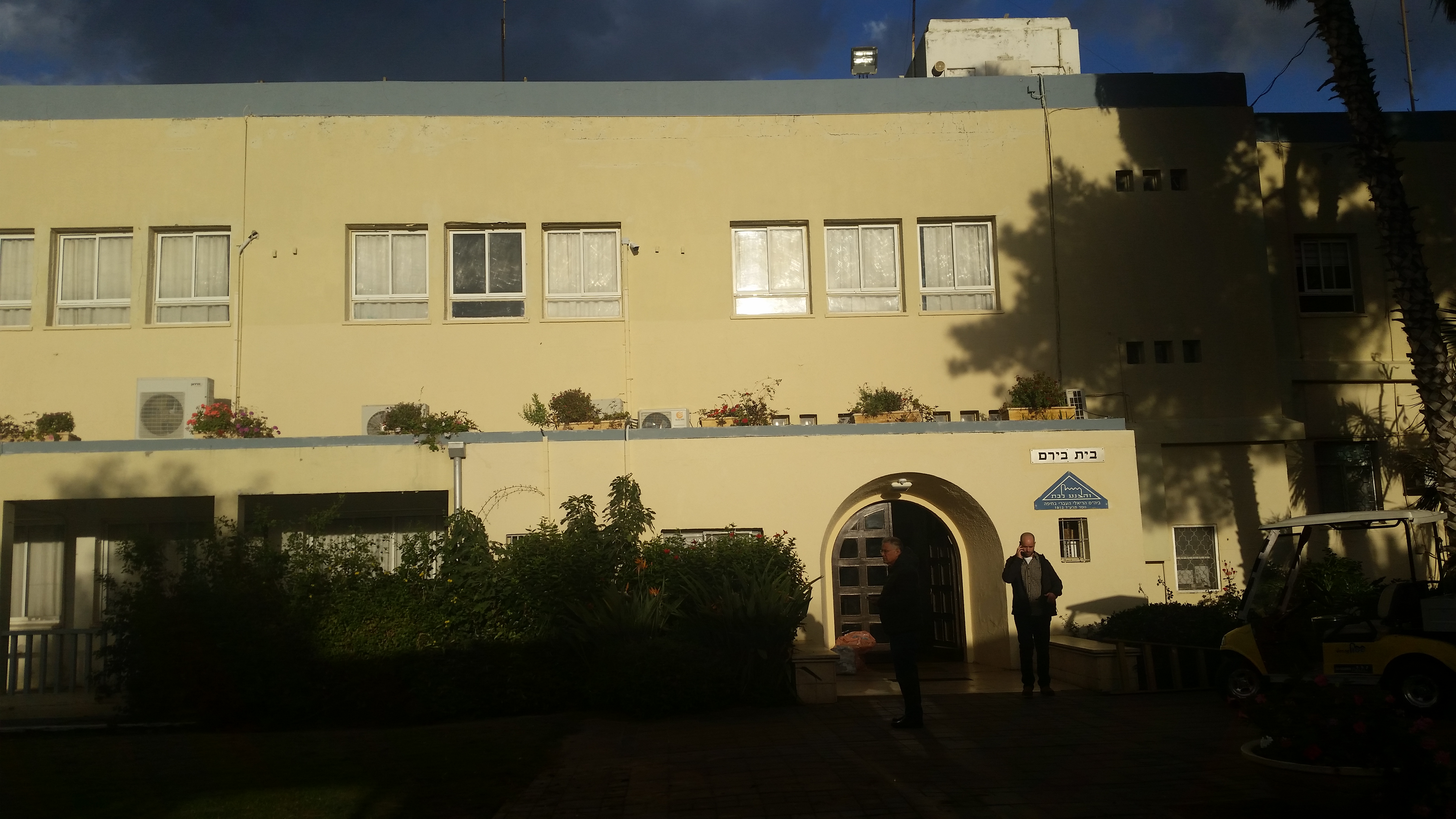 קמפוס בית בירם שוכן על הכרמל שייך לבית הספר הריאלי המבנה הראשון שהוקם בקמפוס בית בירם